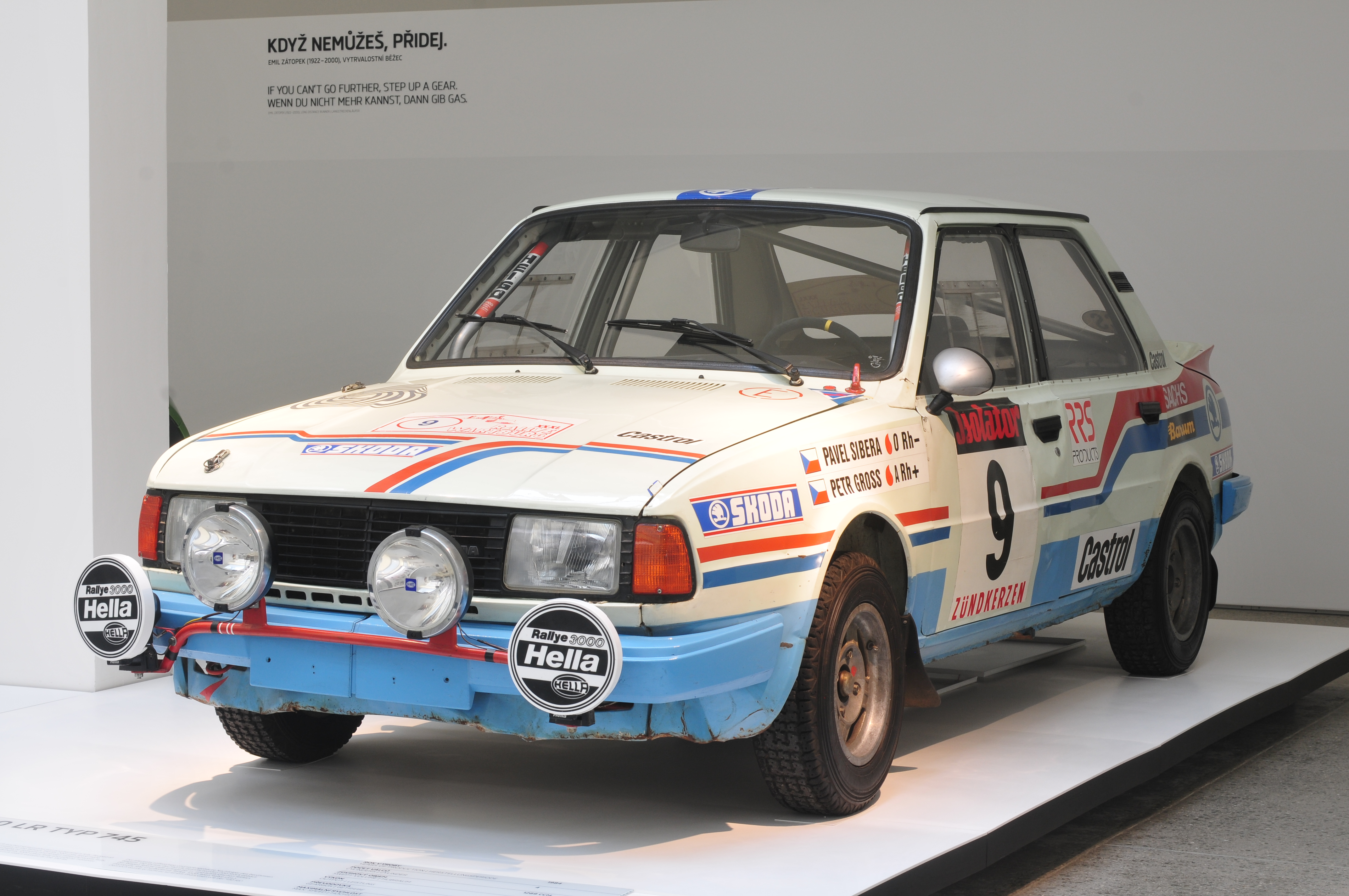 Fototermin Škoda Museum Mladá Boleslav 2013 Fototermin Škoda Muzeum 5. April 2013 in Mladá Boleslav This work is free and may be used by anyone for any purpose. If you wish to use this content, you do not need to request permission as long as you follow any licensing requirements mentioned on this page.